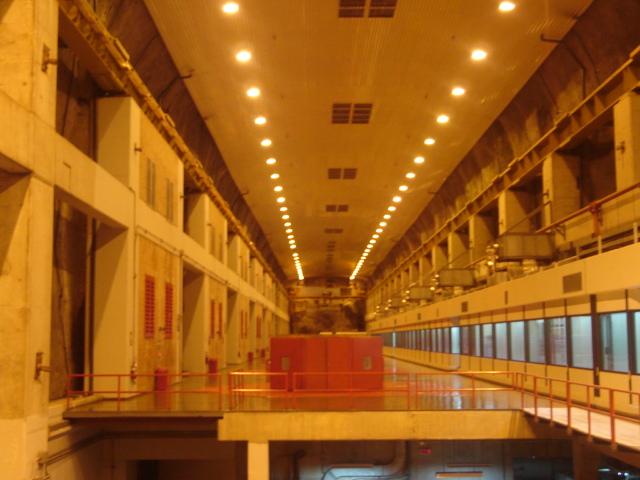 Casa de Maquinas Guavio